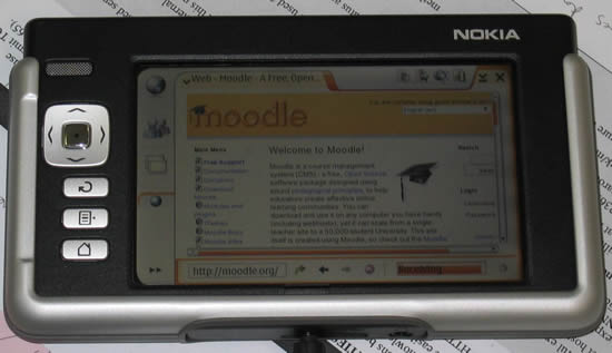 Moodle on a Nokia 770